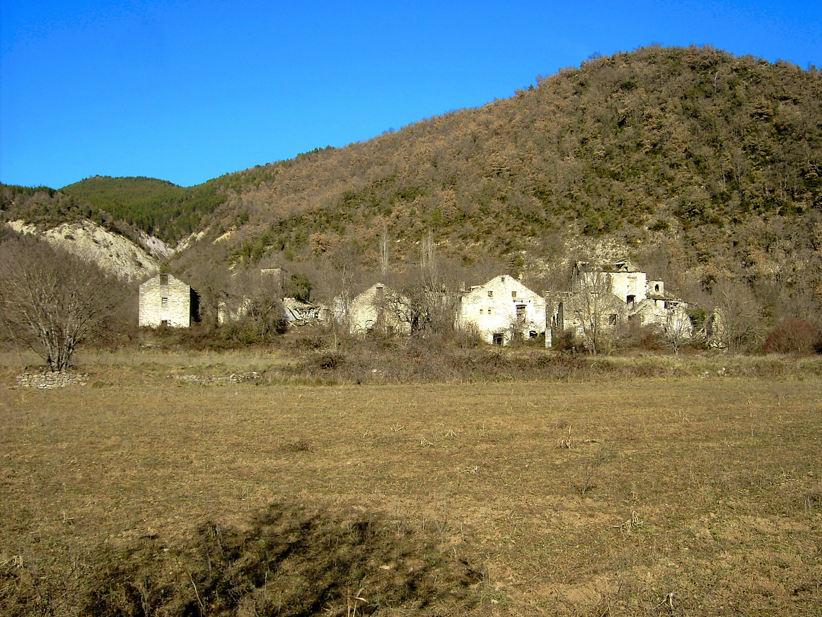 La aldea de Lacort, en la Ribera de Fiscal (Valle del Ara, Huesca). Lugar despoblado por expropiación ante el proyecto de Embalse de Jánovas que nunca se llegó a erigir.